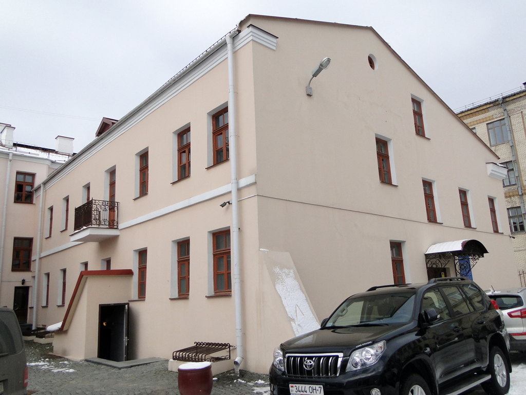 Мінск. Вуліца Рэвалюцыйная, 13